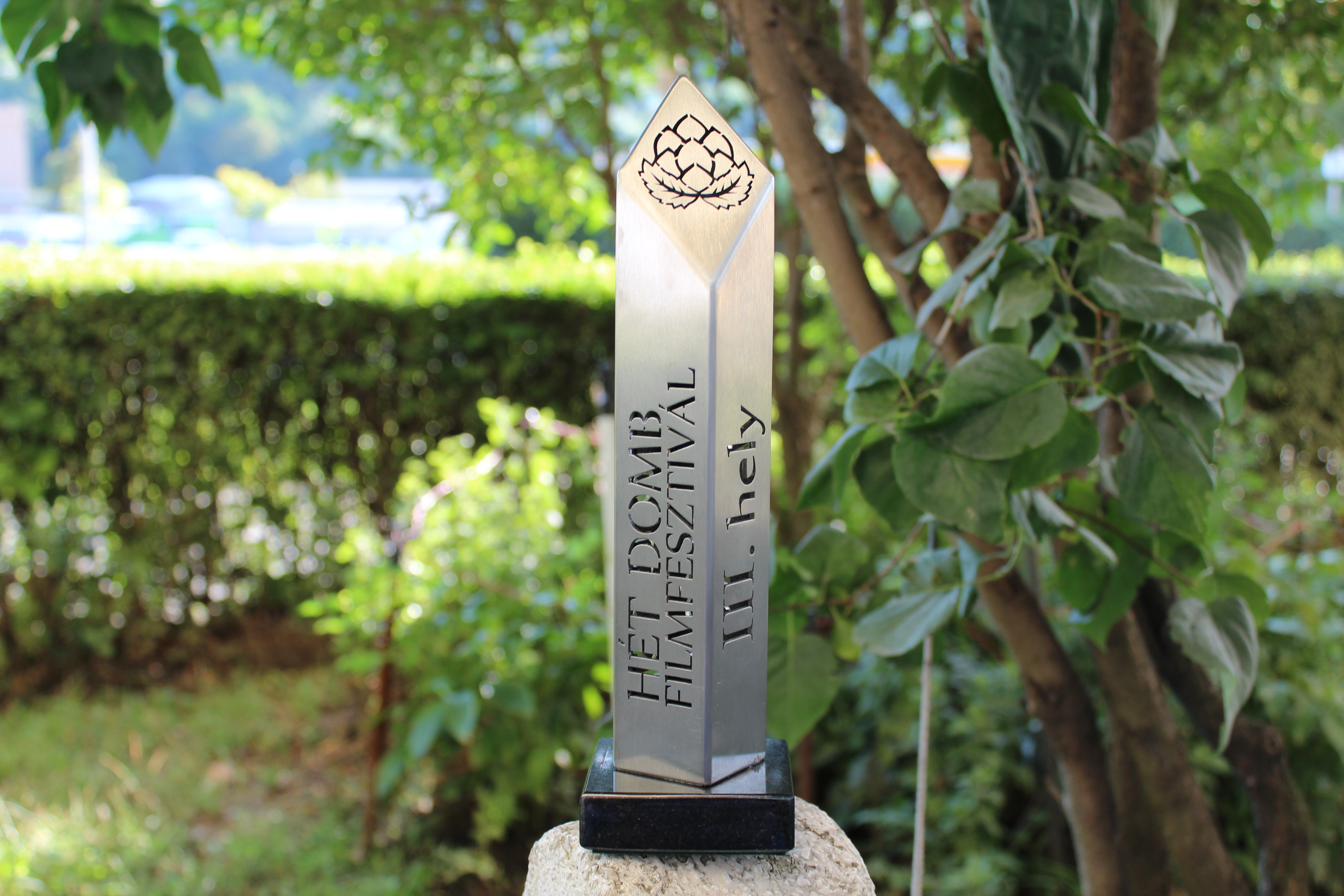 a Hét Domb Filmfesztivál III. helyezéséért járó díj (2018.09.02., Komló online)